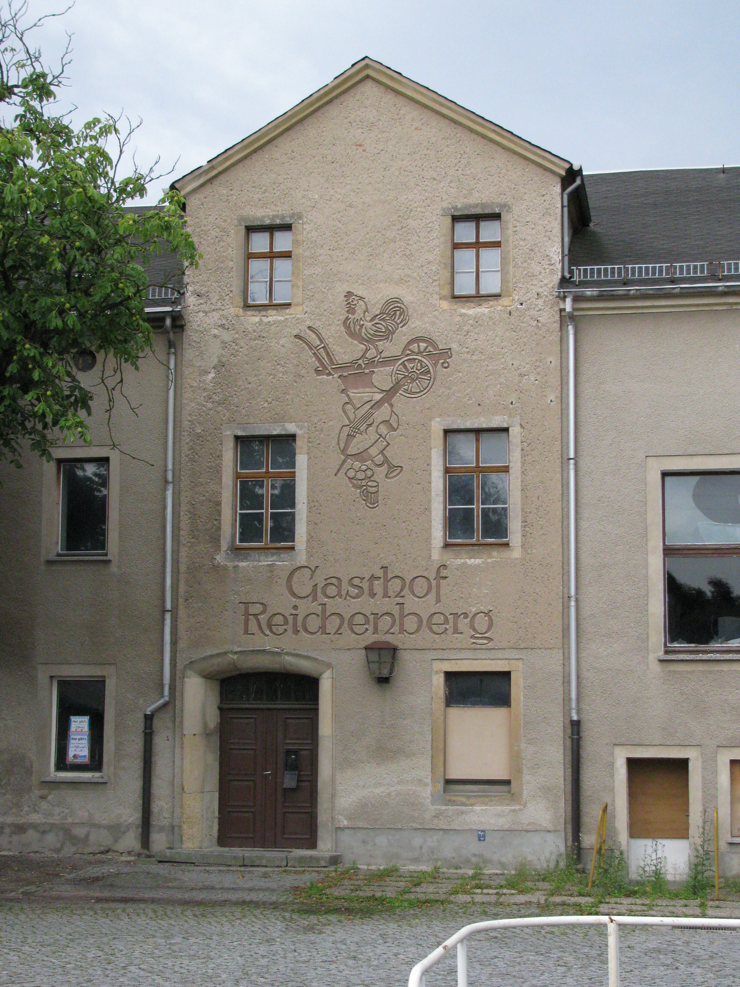 Geschlossener Gasthof Reichenberg, Gemeinde Moritzburg, Sachsen